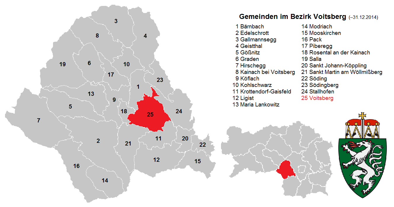 Bezirk Voitsberg